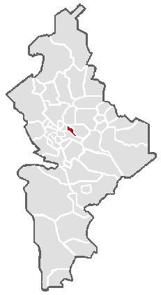 Ubicación geográfica del municipio de Marín en el estado mexicano de Nuevo León.